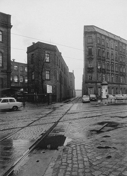 Leipzig Plagwitz, 1989. Industriestammgleis PI die Karl-Heine-Strasse kreuzend, Blickrichtung Bahnhof Plagwitz.